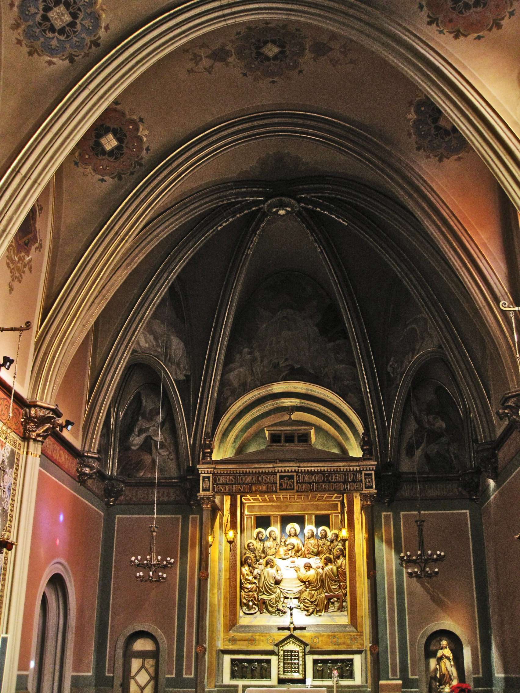 Capella del Santíssim, obra de Lluís Muncunill de 1907, a la Catedral de Terrassa.